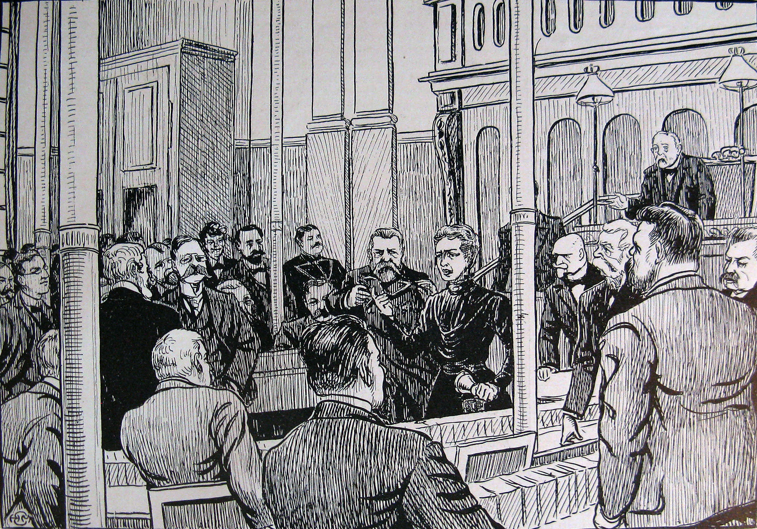 Mary Westenholz på Folketingets talerstol 19. august 1909